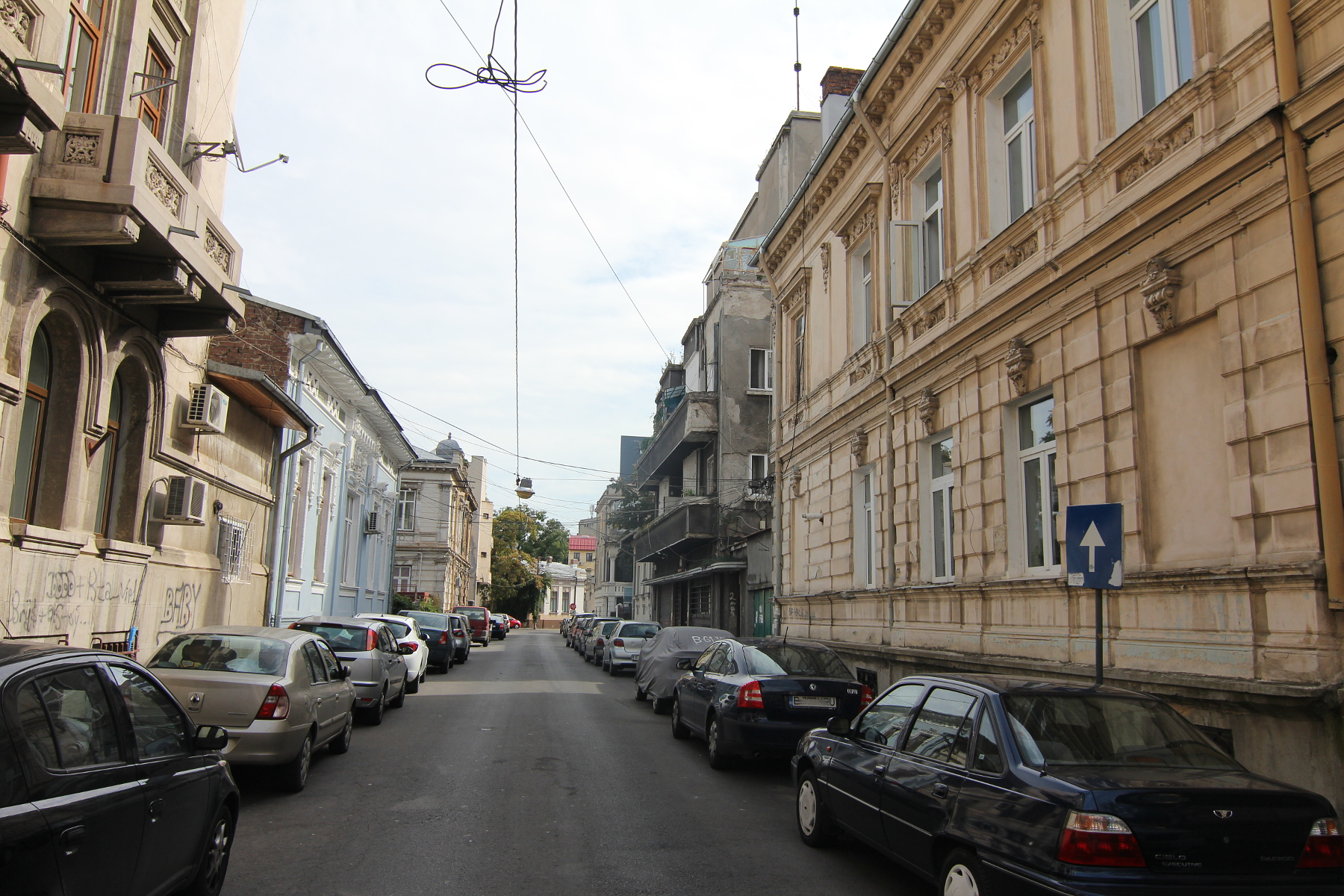 Ansamblul de arhitectură "Str. C.F. Robescu"